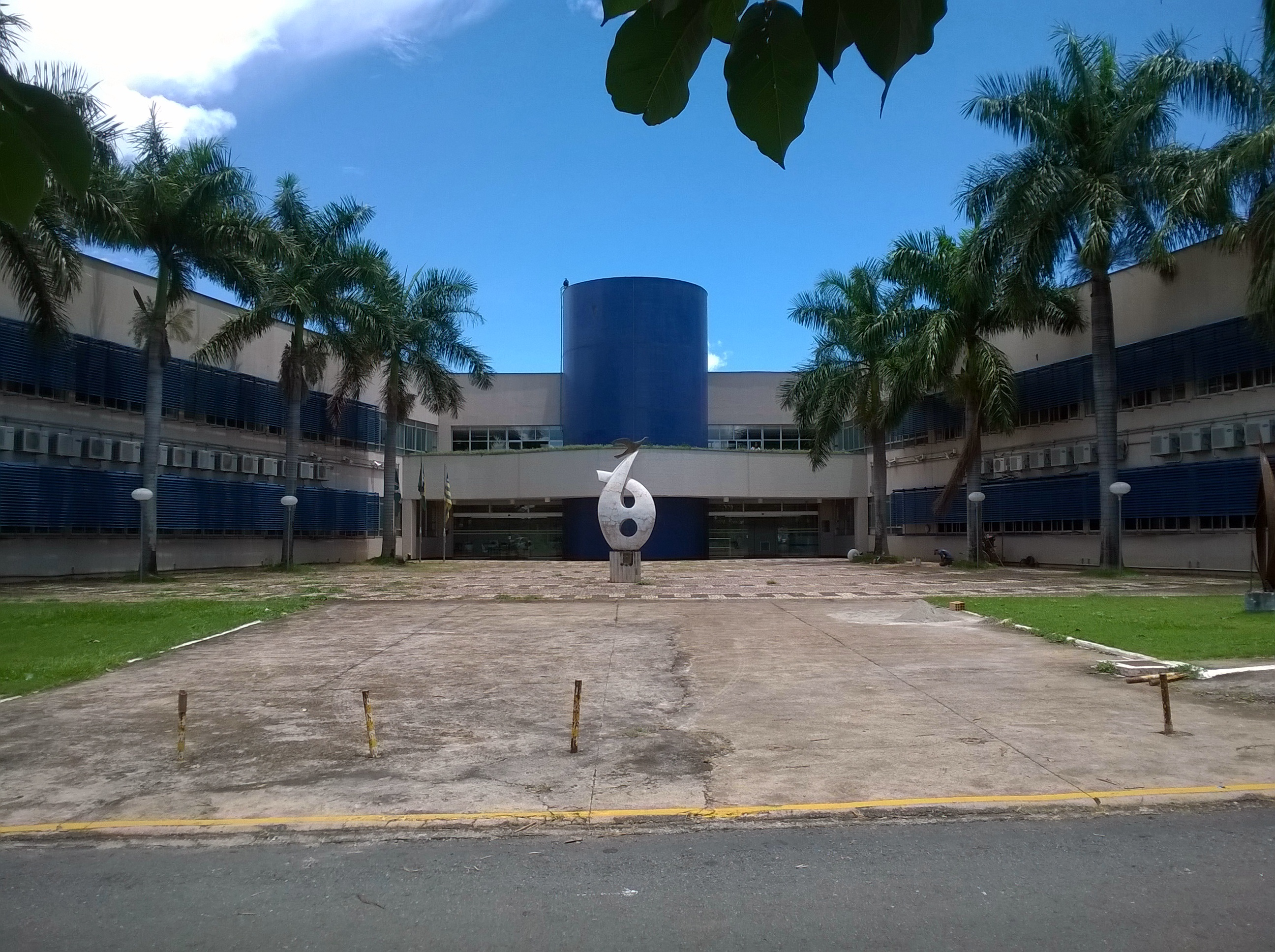 Prédio da reitoria da Universidade Federal de Goiás, localizado no Câmpus II (Samambaia), fotografado em 3 de março de 2015.